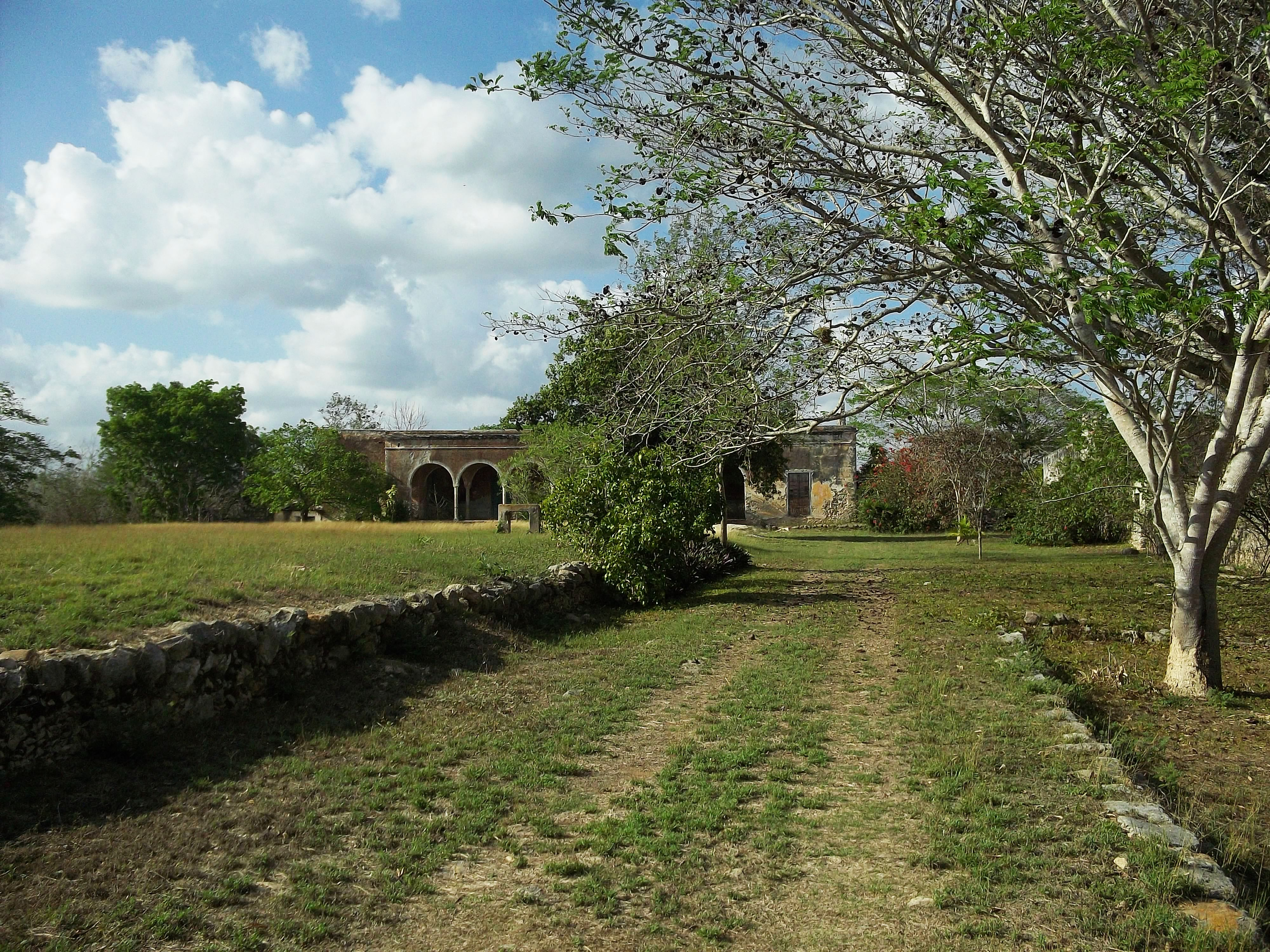 Hacienda de Kankabchén (Tixkokob), Yucatán.